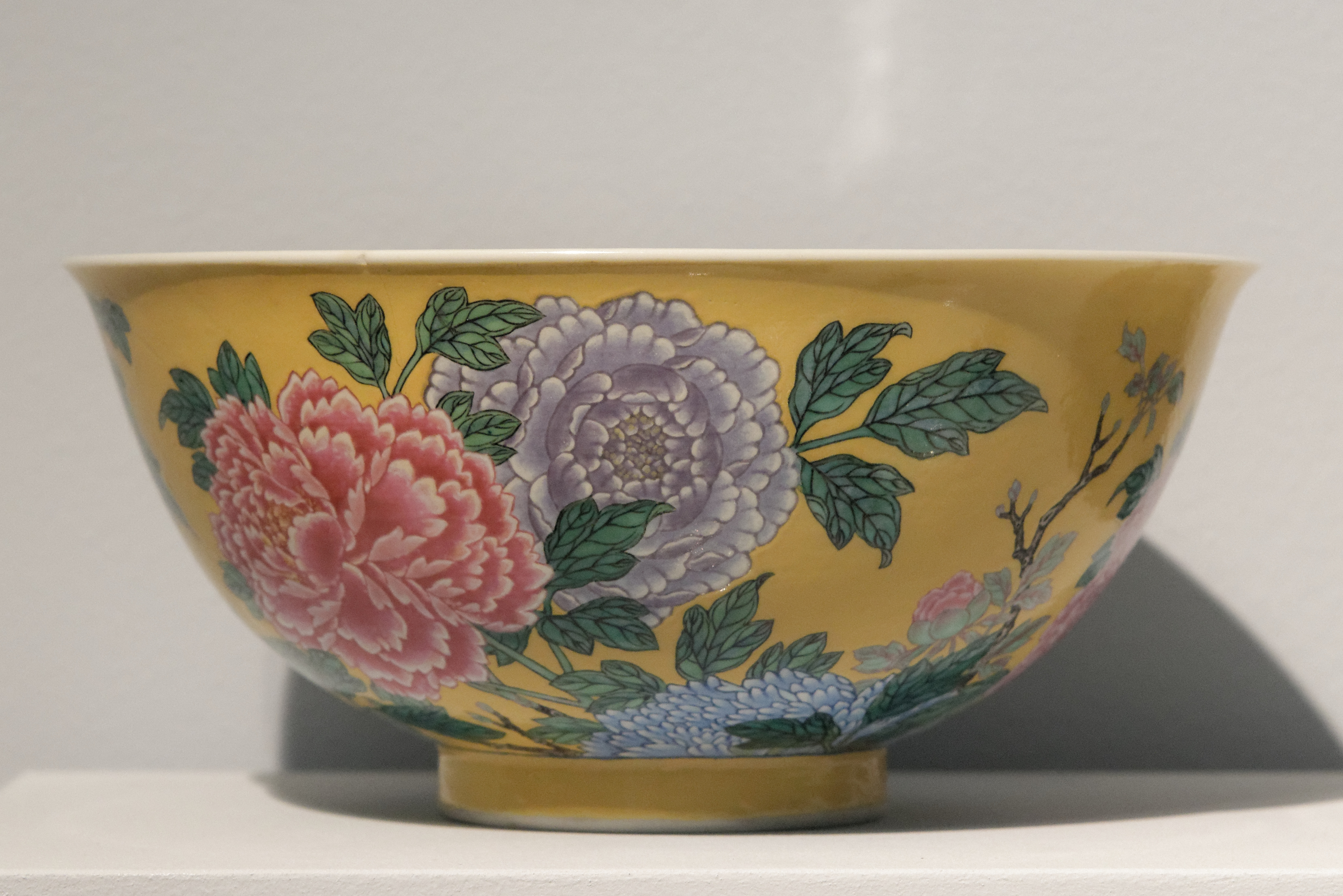 Bol impérial en porcelaine famille rose des fours de Jingdhezen, dynastie Qing (1644–1911), règne et marque de Kangxi (1662–1722).